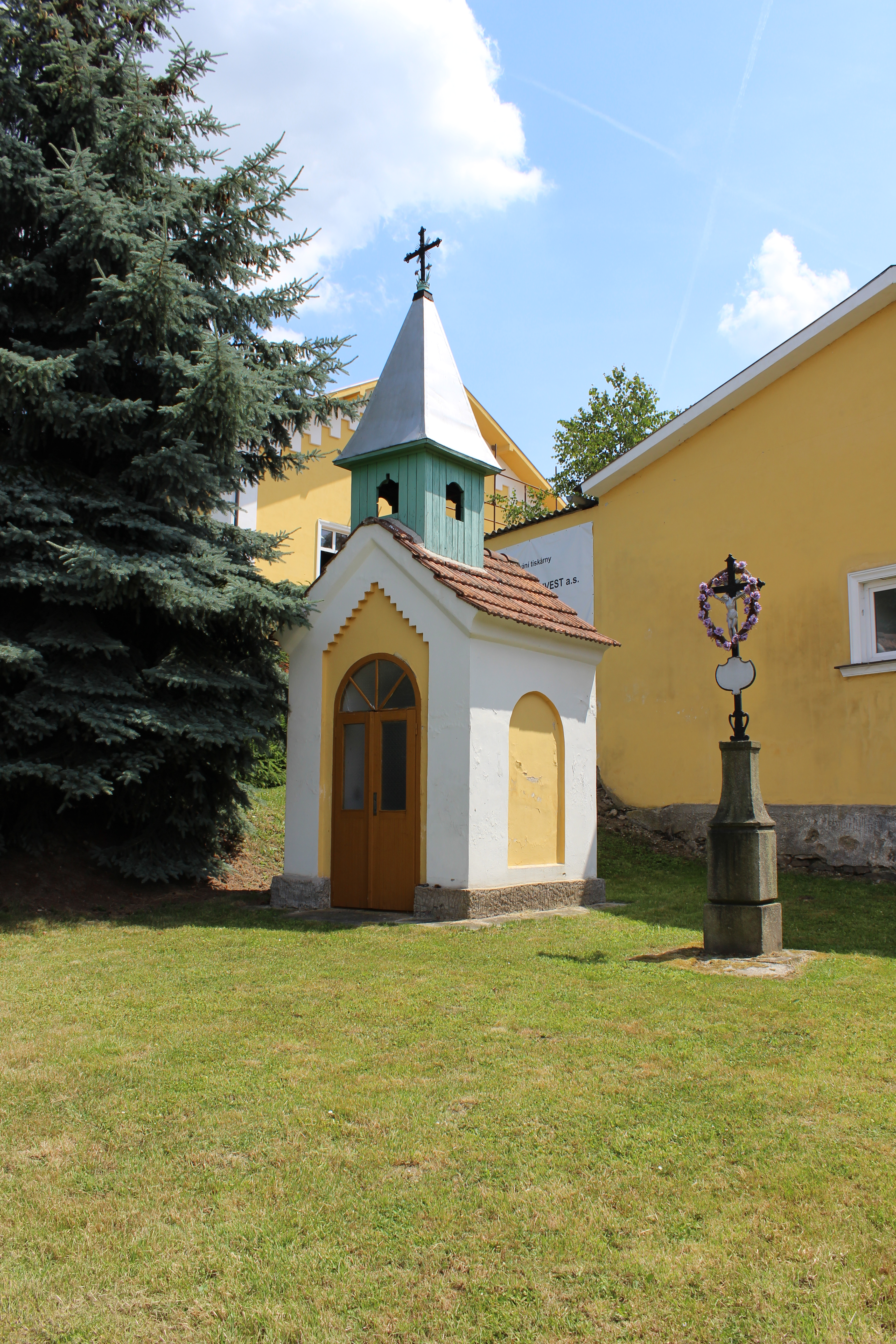 Kaplička v Alberovicích.